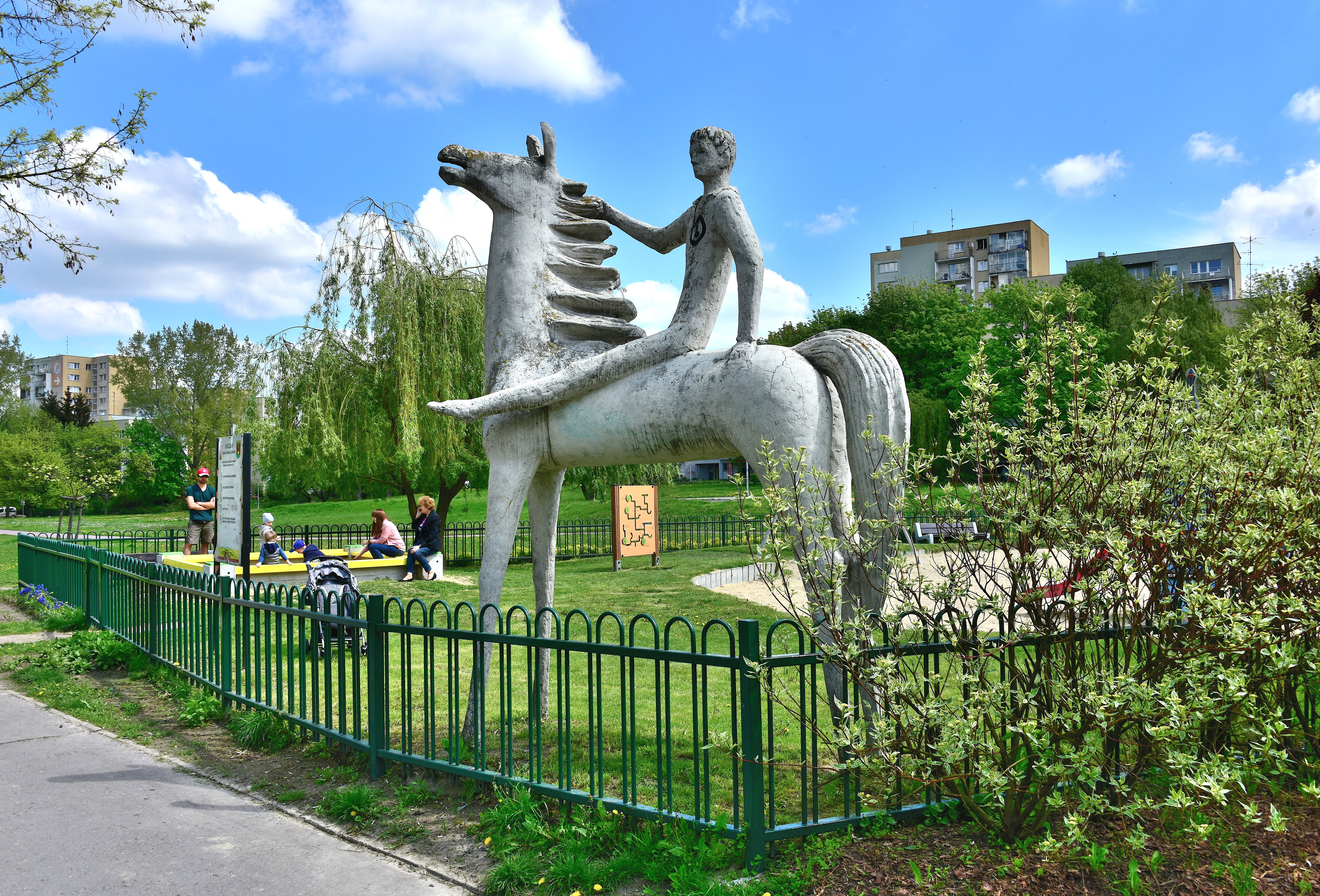 Rzeźba Jeździec na koniu w parku im. Romana Kozłowskiego w Warszawie